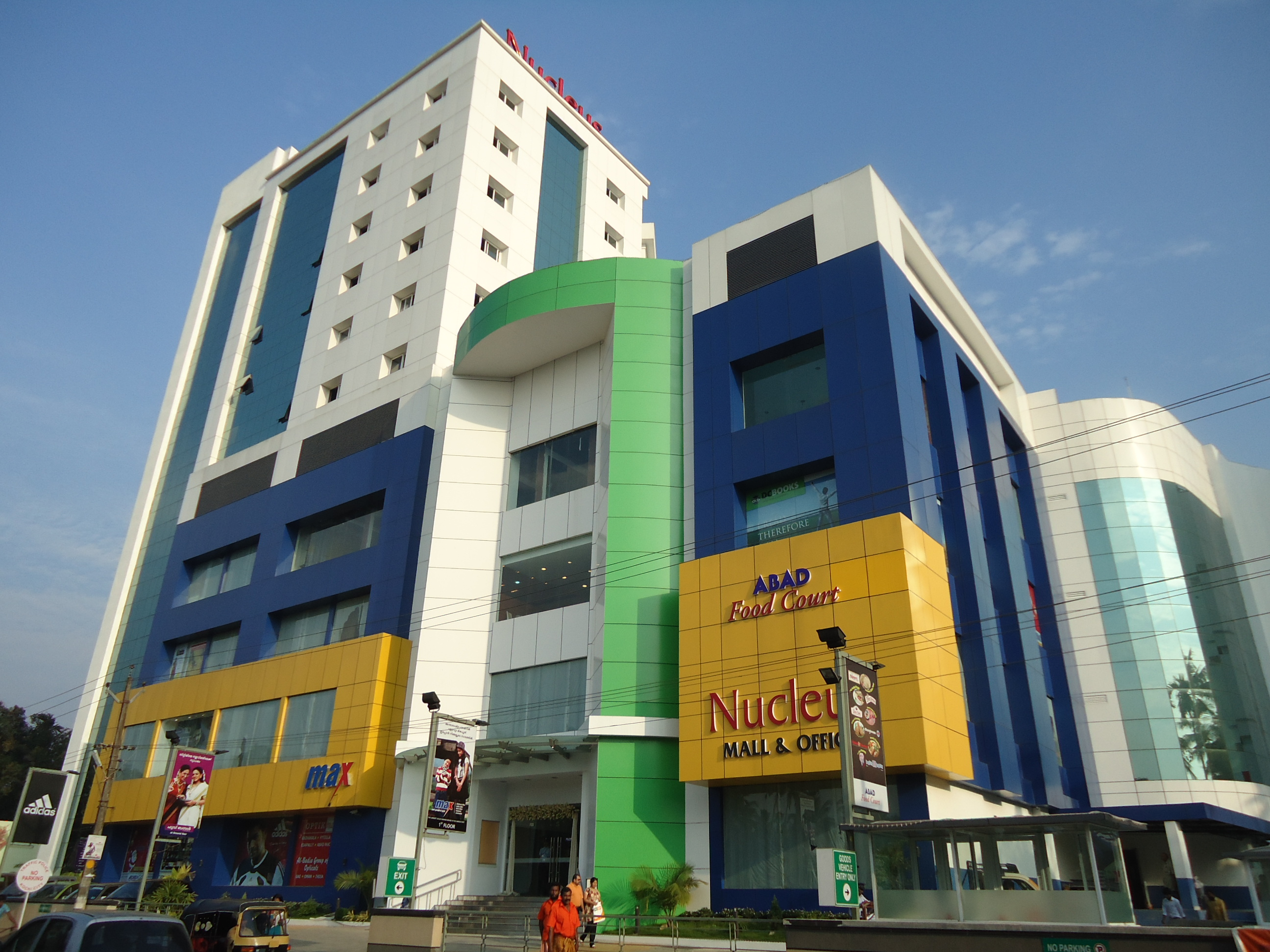 Abad_Nucleus_Mall_Front